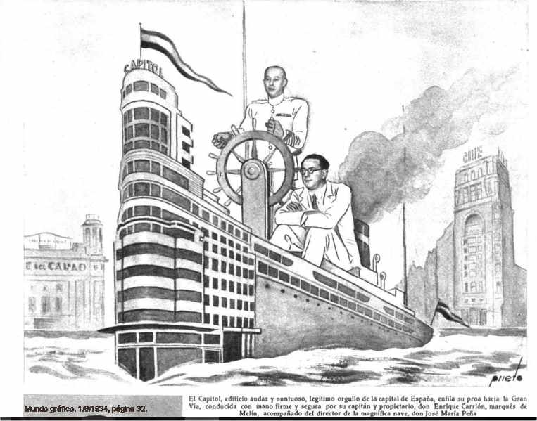 El Capitolio, edificio audaz y suntuoso, legitimo orgullo orgullo de la Capital de España, enfila su proa hacia la Gran Via, conducida con mano firme y segura por su capitan y proprietario, don Enrique Carrion, marques de Melin, acompañado del director de la magnifica nave, don Jose Maria Peña.